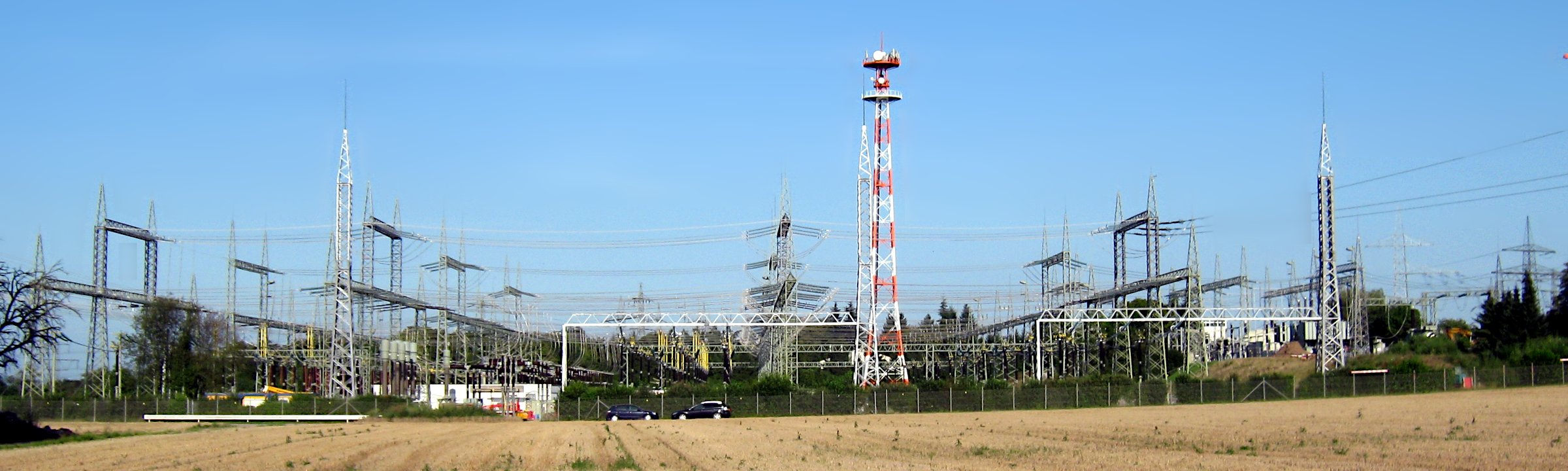 östliche 220-kV-Schaltanlage des Umspannwerks Hoheneck